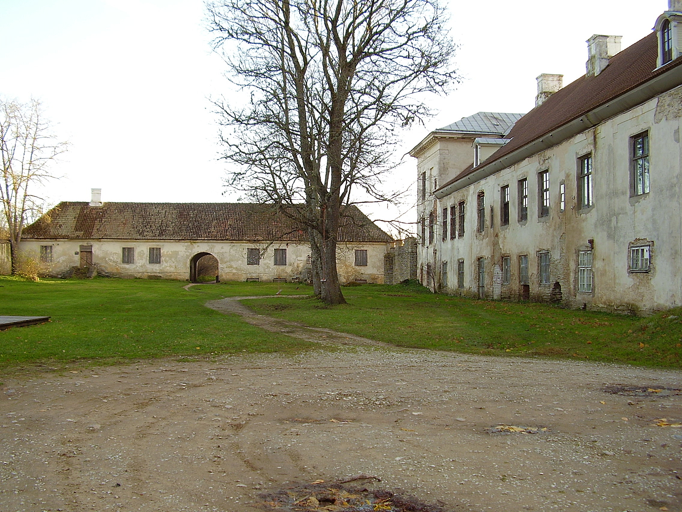 Kolga mõisa teenijatemaja